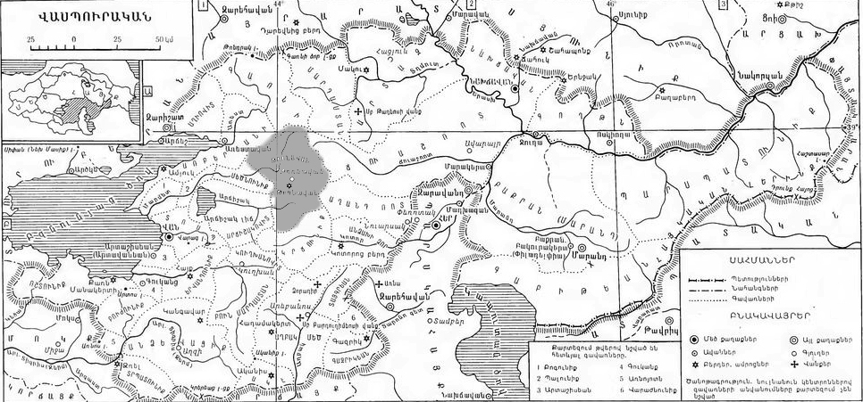 Վասպուրական